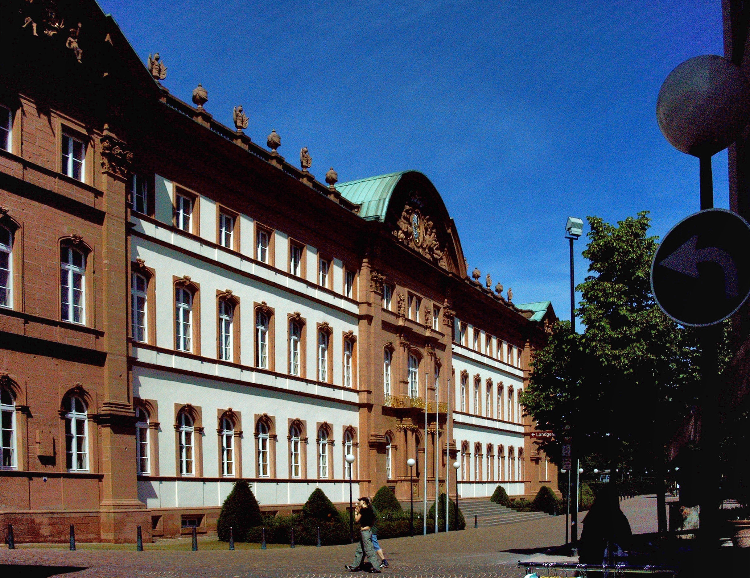 Zweibrücker Schloss Fotograf: Benutzer:Heg